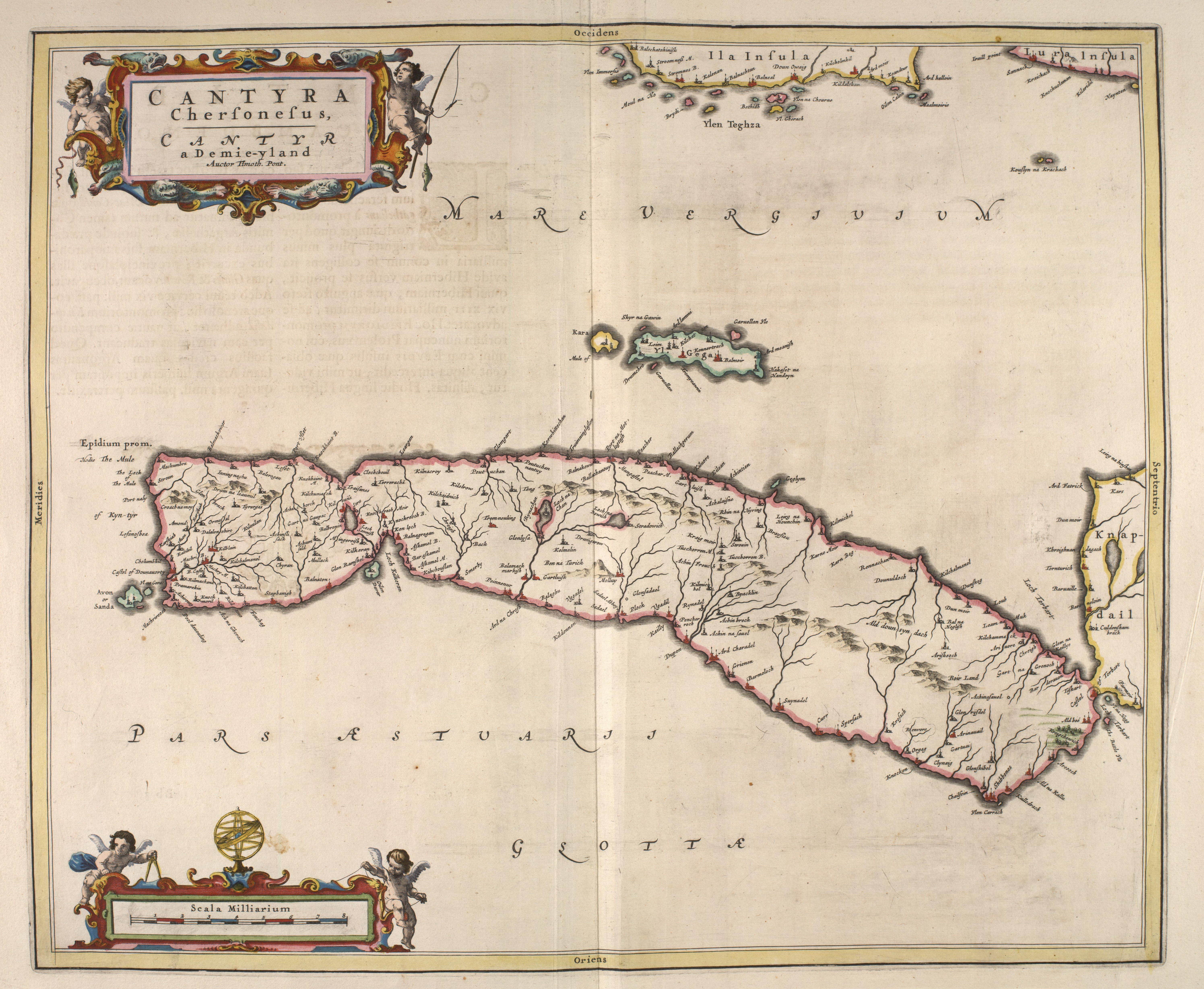 CANTYRA - Kintyre